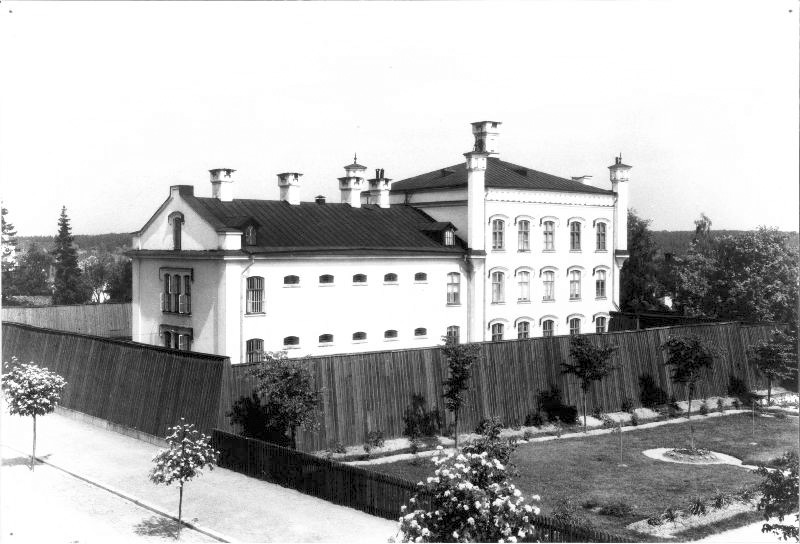 Kronohäktet i Hudiksvall